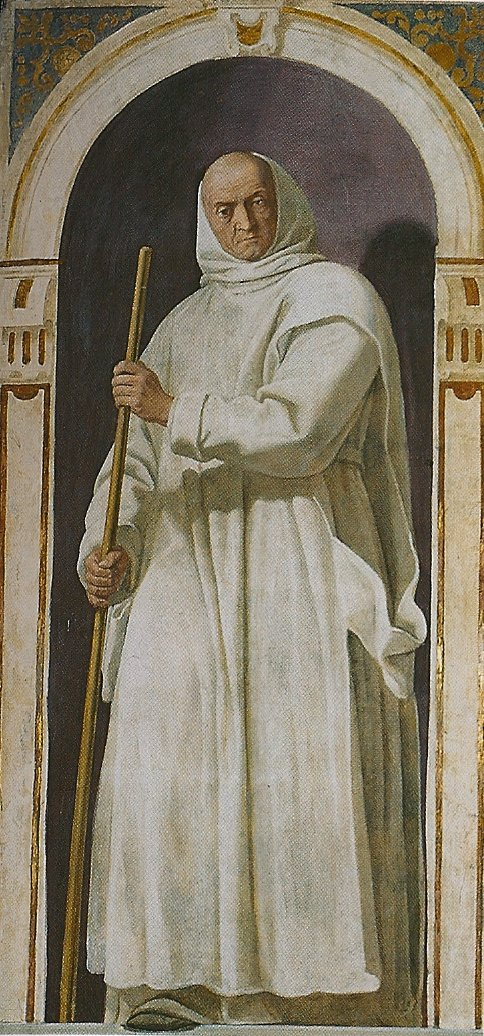 Le Bienheureux Odon de Novare (Odo of Novara), oeuvre de Daniele Crespi (1629) à la chartreuse de Garegnano à Milan